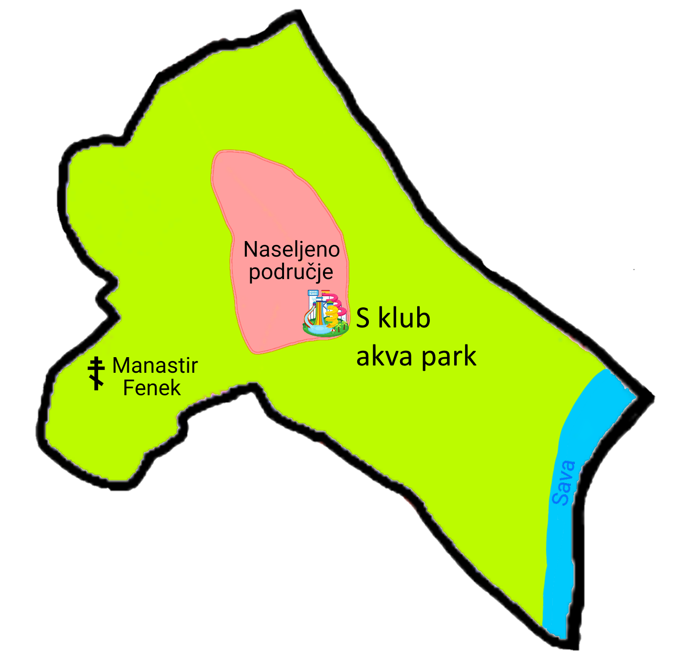 Srpski (latinica): Mapa Jakova